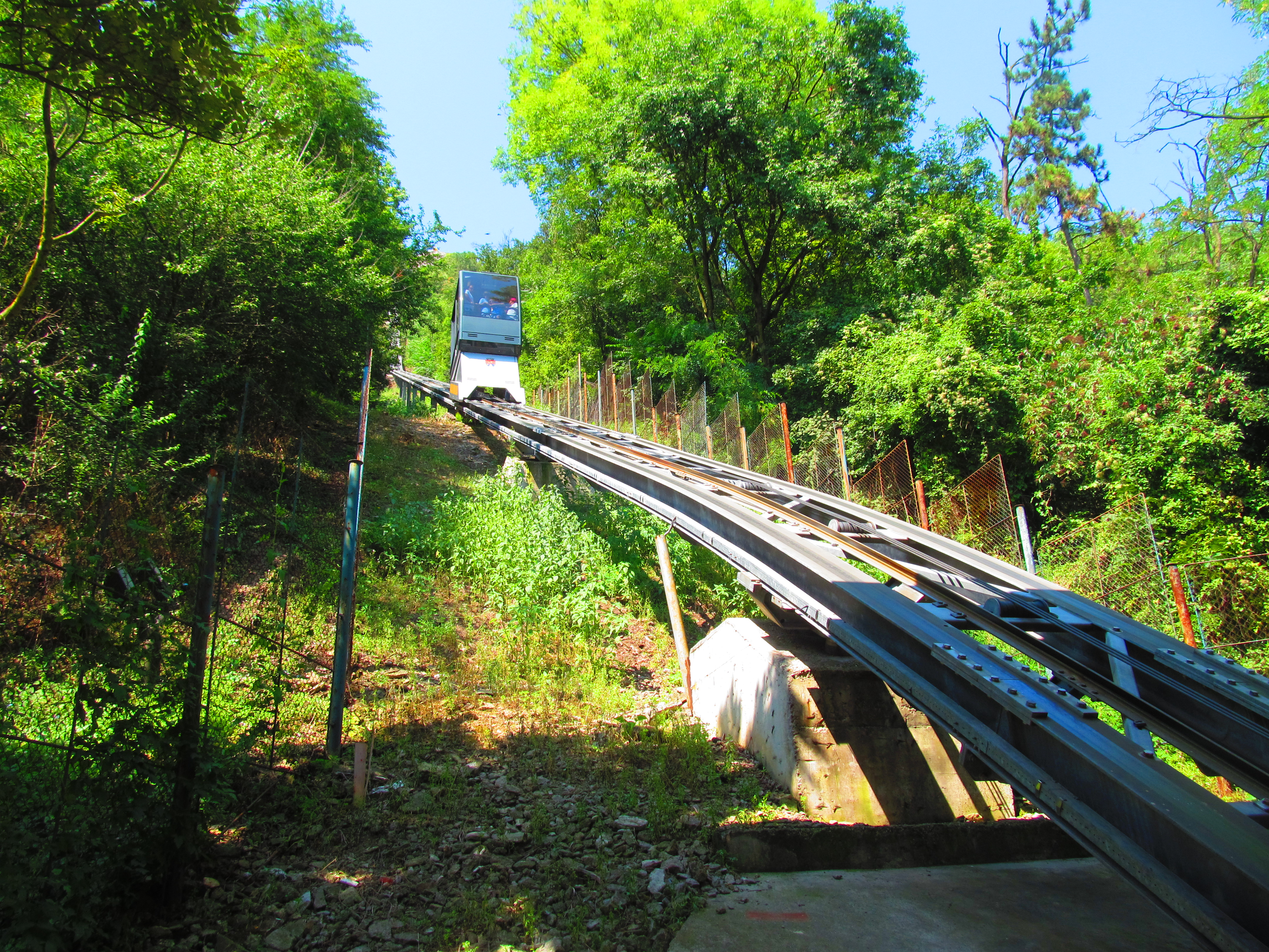 Ansamblul Cetatea medievală Deva